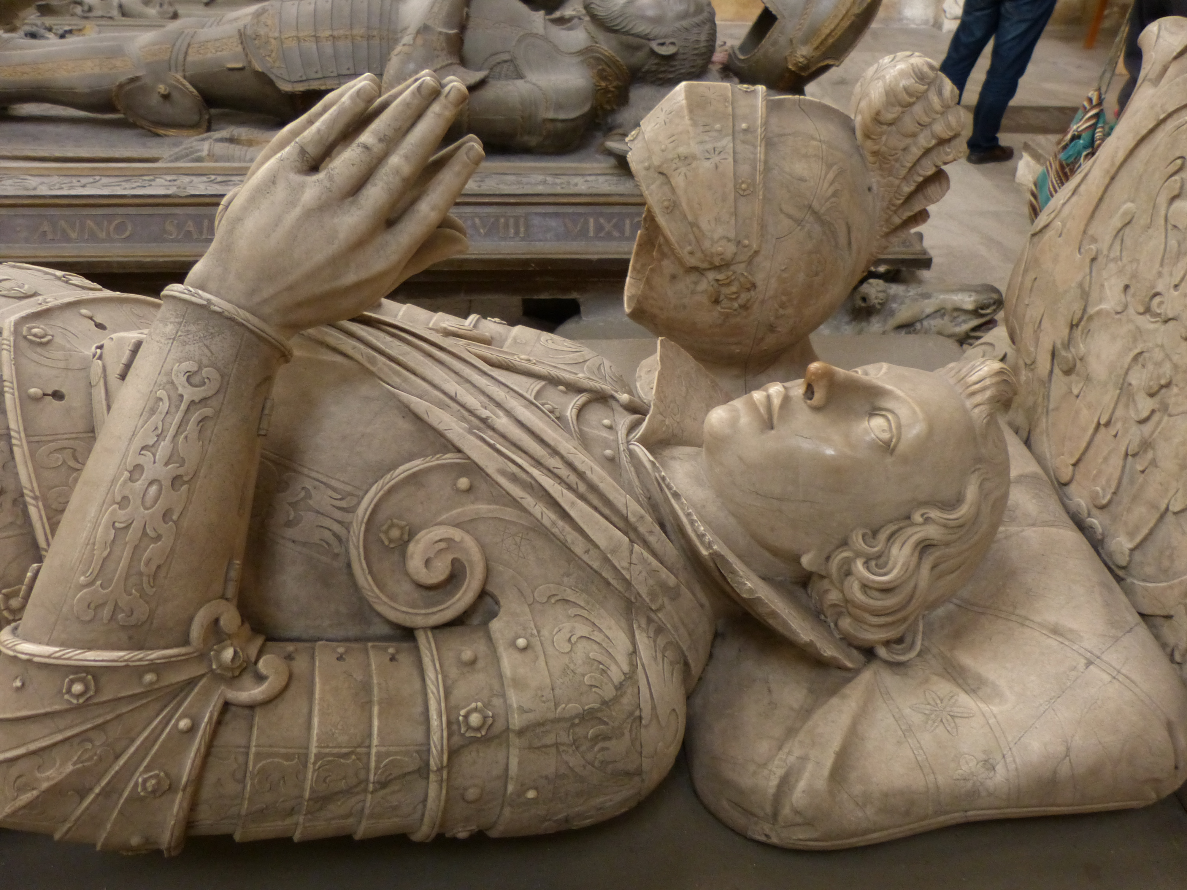 Grablege in der Stiftskirche von Tübingen, Baden-Württembergl